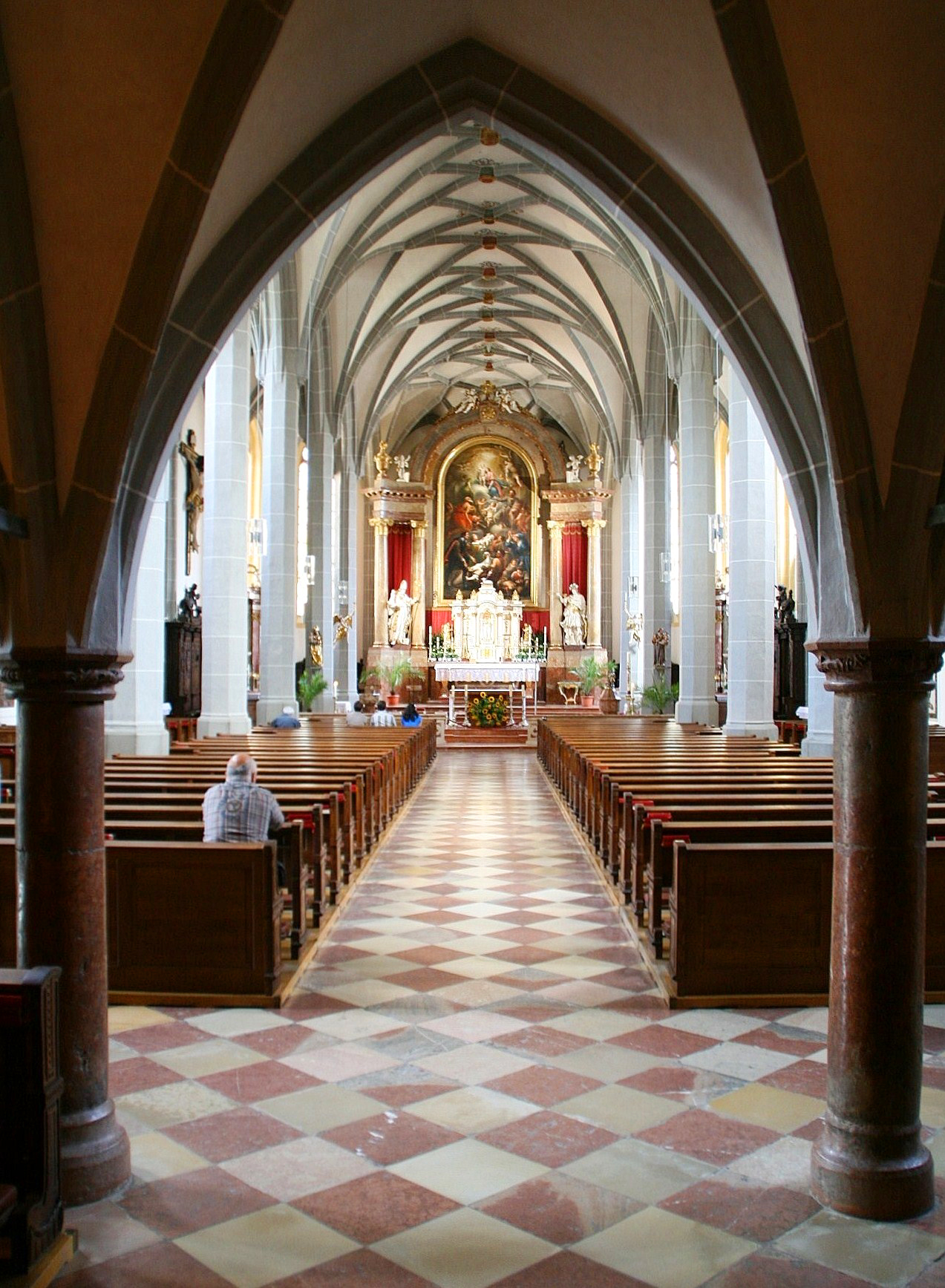 Die Stiftspfarrkirche St. Philipp und Jakob des Wallfahrtsortes Altötting (Landkreis Altötting, Oberbayern). Blick durch Langhaus zum Chor. Bei der Stiftspfarrkirche handelt es sich um eine dreischiffige spätgotische Hallenkirche.